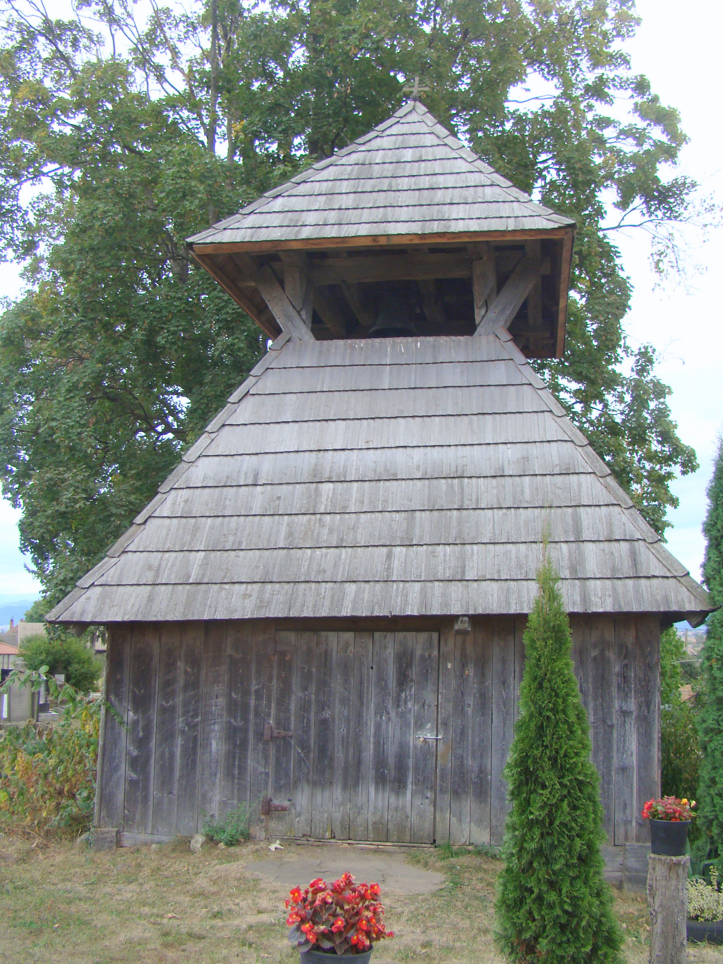 Clopotniță de lemn, sat Hătuica; comuna Catalina 114 1668 02